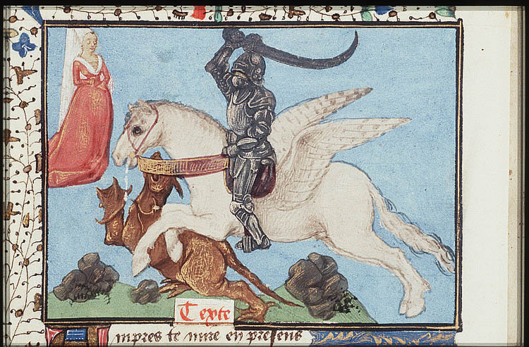 Perseus and Andromeda // Den Haag, KB, 74 G 27 Christine de Pisan, L'épître d'Othéa